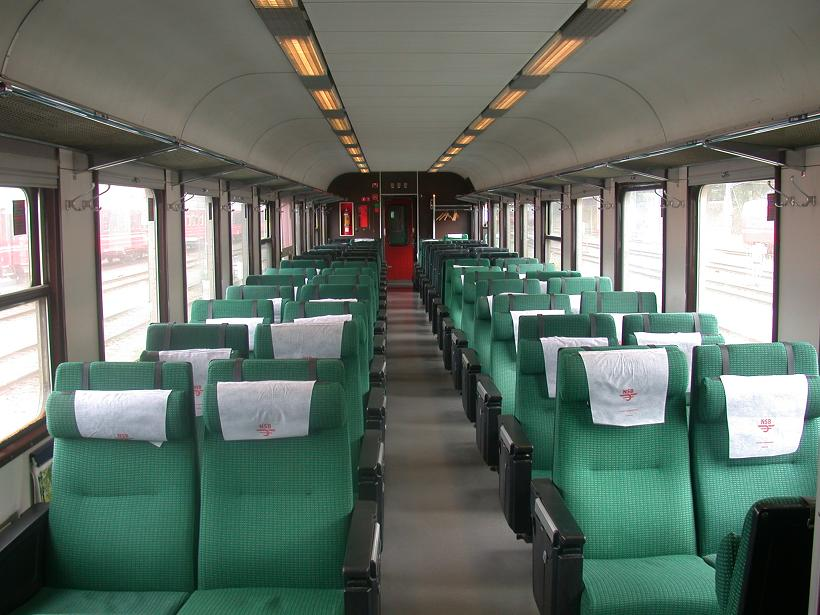 Interiørbilde av B5-vogn fra før moderniseringen. Datoen er omtrentlig.